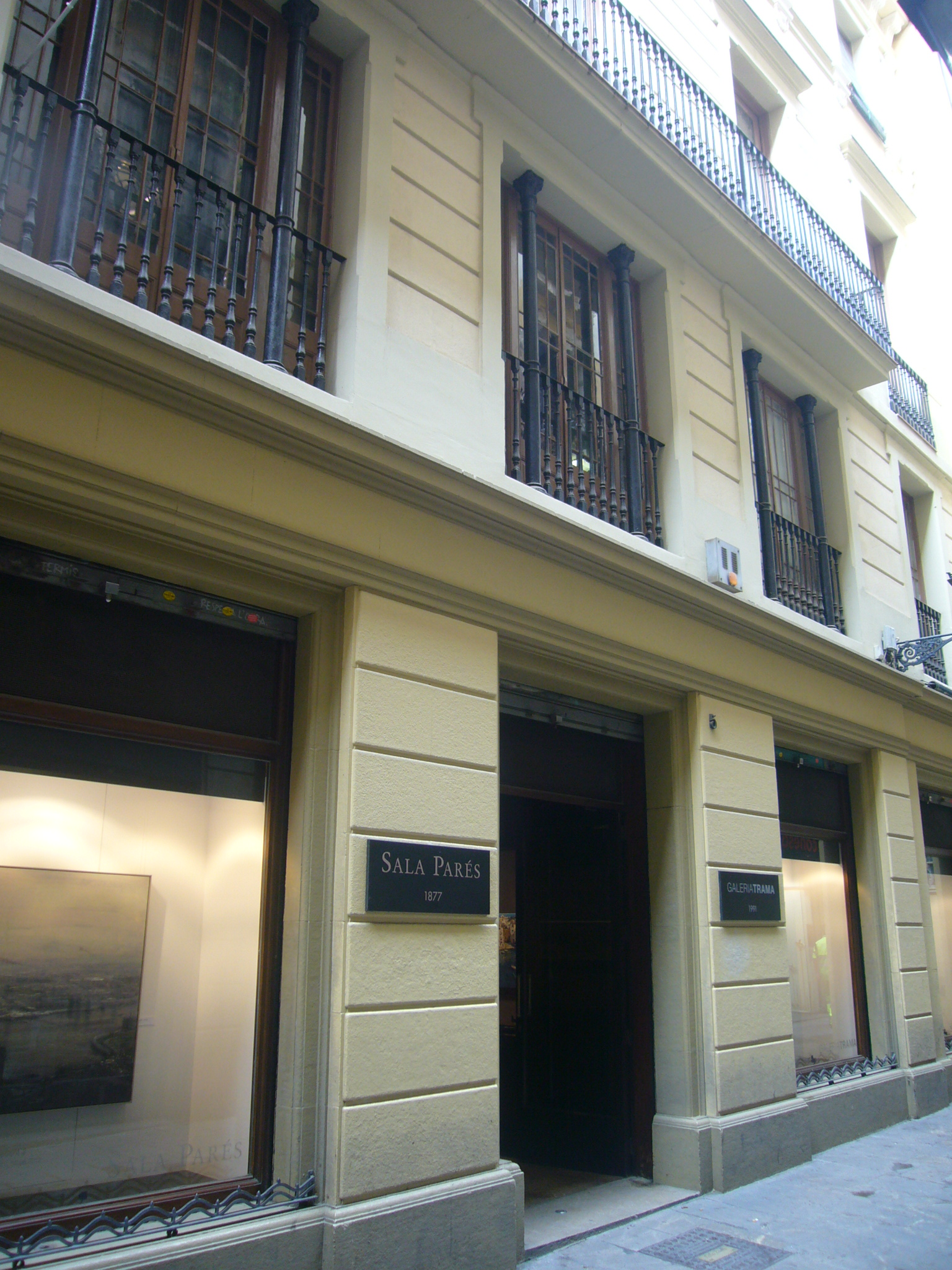 Sala Parés